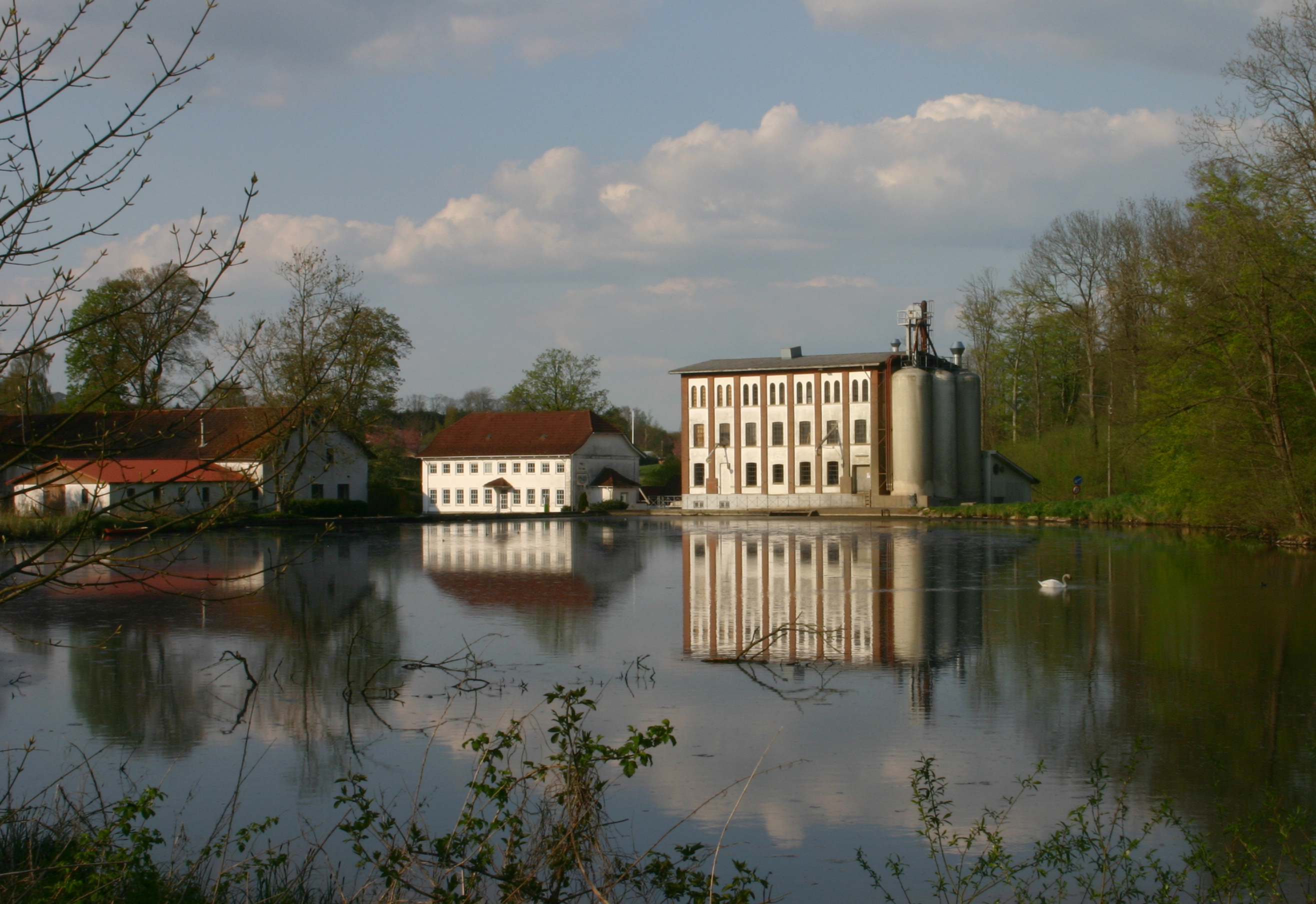 Drabæk Mølle is founded about year 1100 in Lunderskov, near Kolding in Denmark.